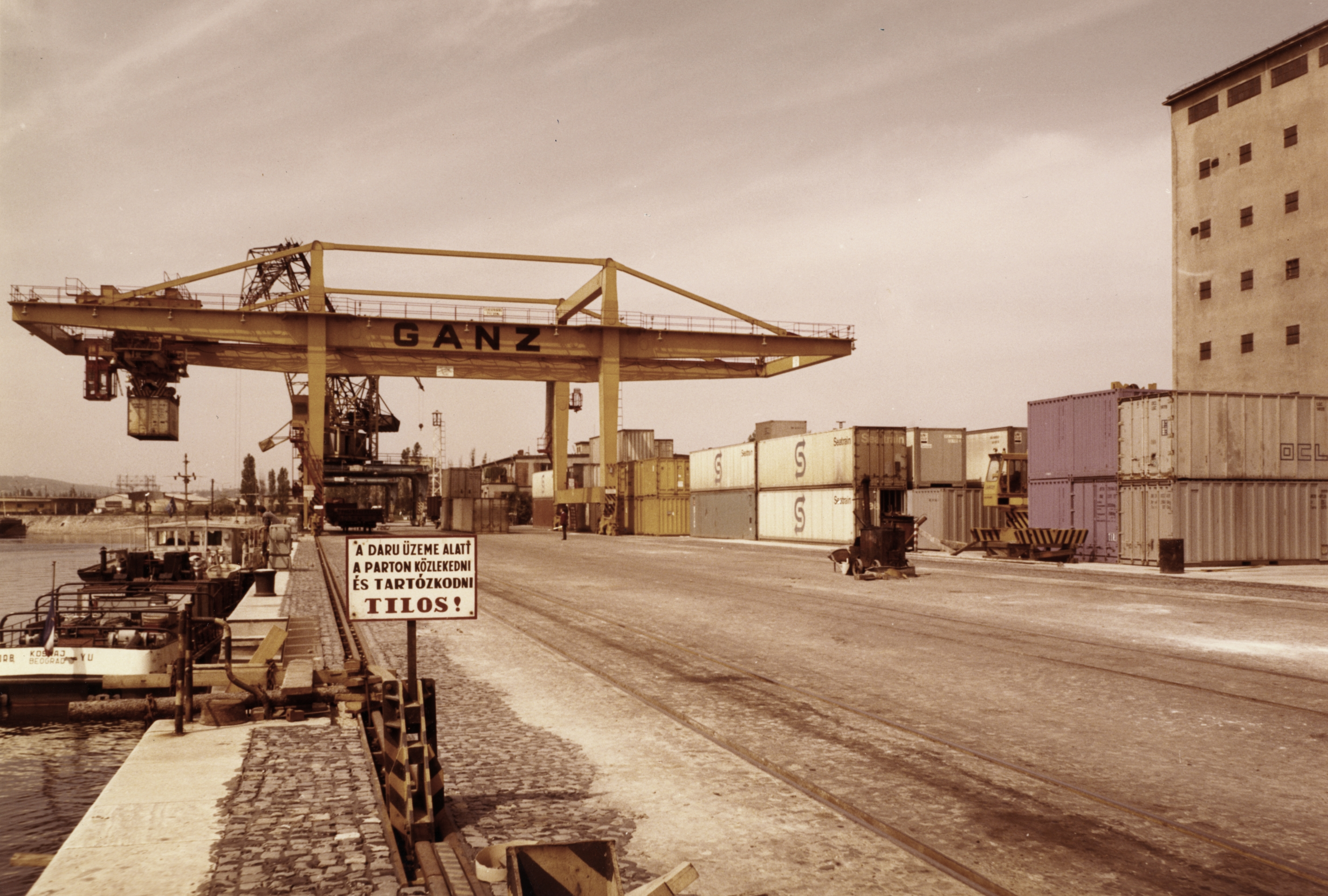 Csepel, Szabadkikötő, Konténerterminál. Location: Hungary, Budapest XXI. Tags: colorful, crane, port, container, barge, board, Ganz-brand, Budapest Title: Csepel, Szabadkikötő, Konténerterminál.